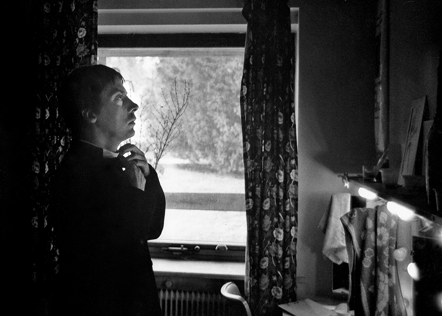 Bo Christer Hjelte förbereder sig i sin loge för en roll som präst i en föreställning på Malmö Stadsteater 1984.